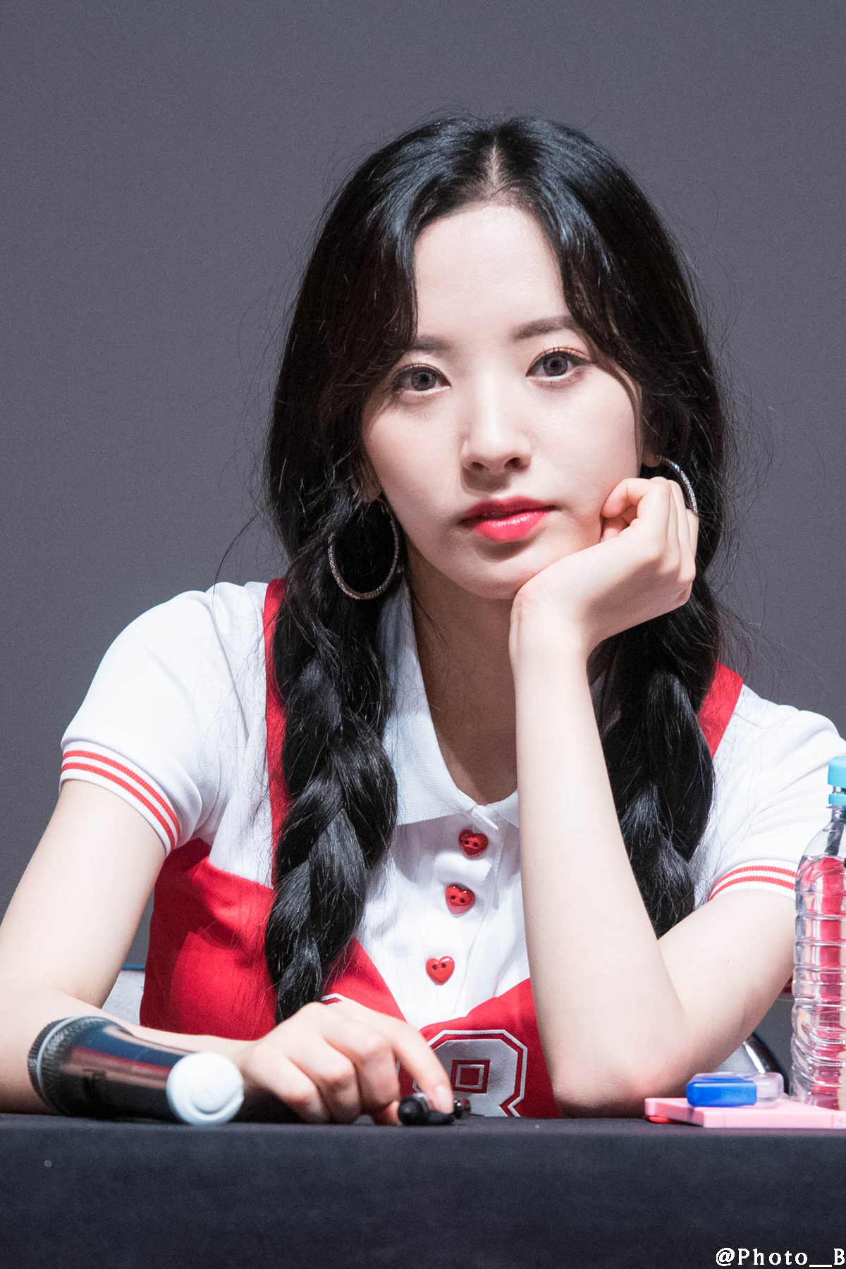 170609 우주소녀 팬싸인회 보나